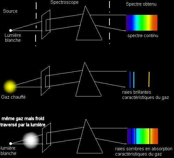 Spectro